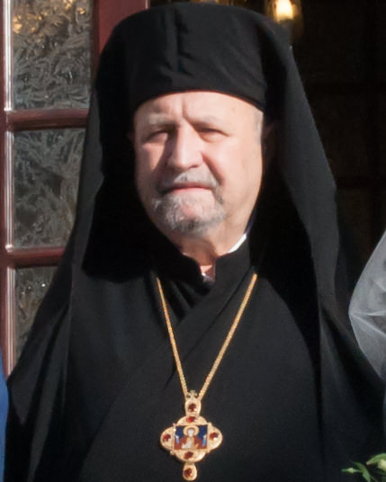 Μητροπολίτης Γέρων Χαλκηδόνος Αθανάσιος